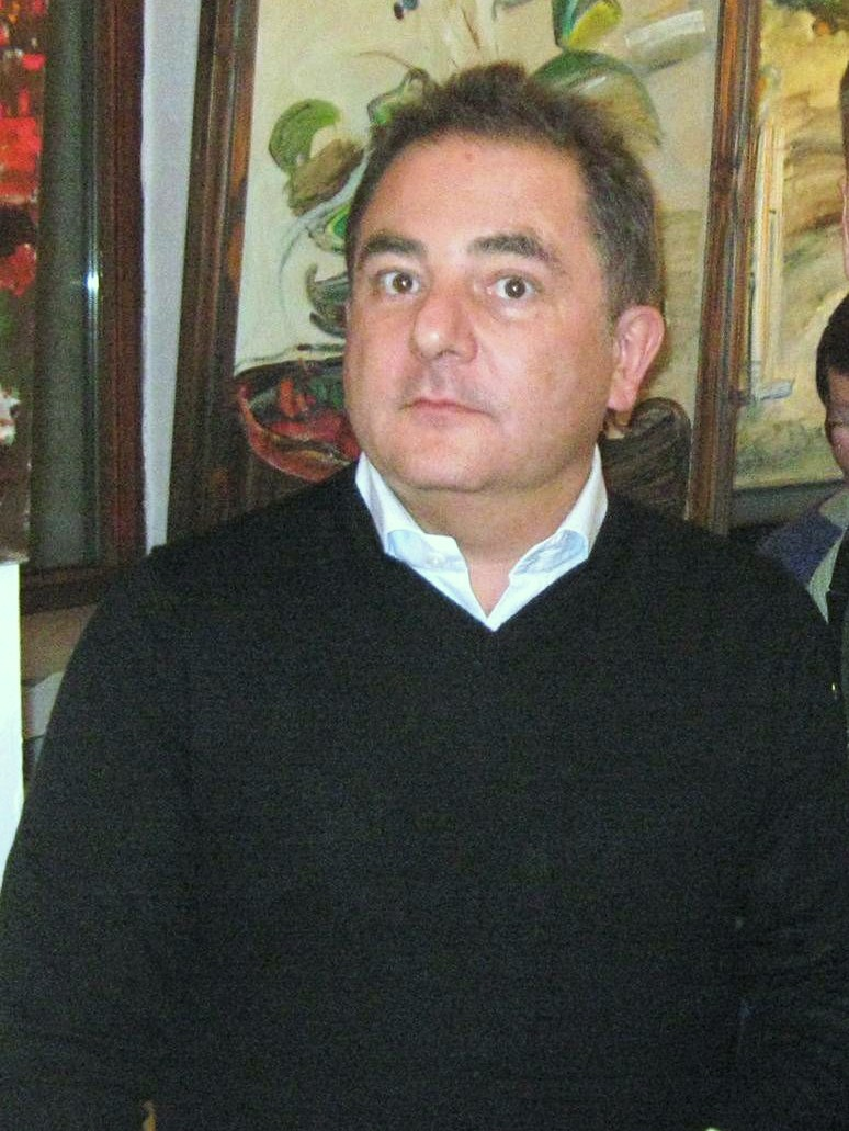 Makłowicz Robert